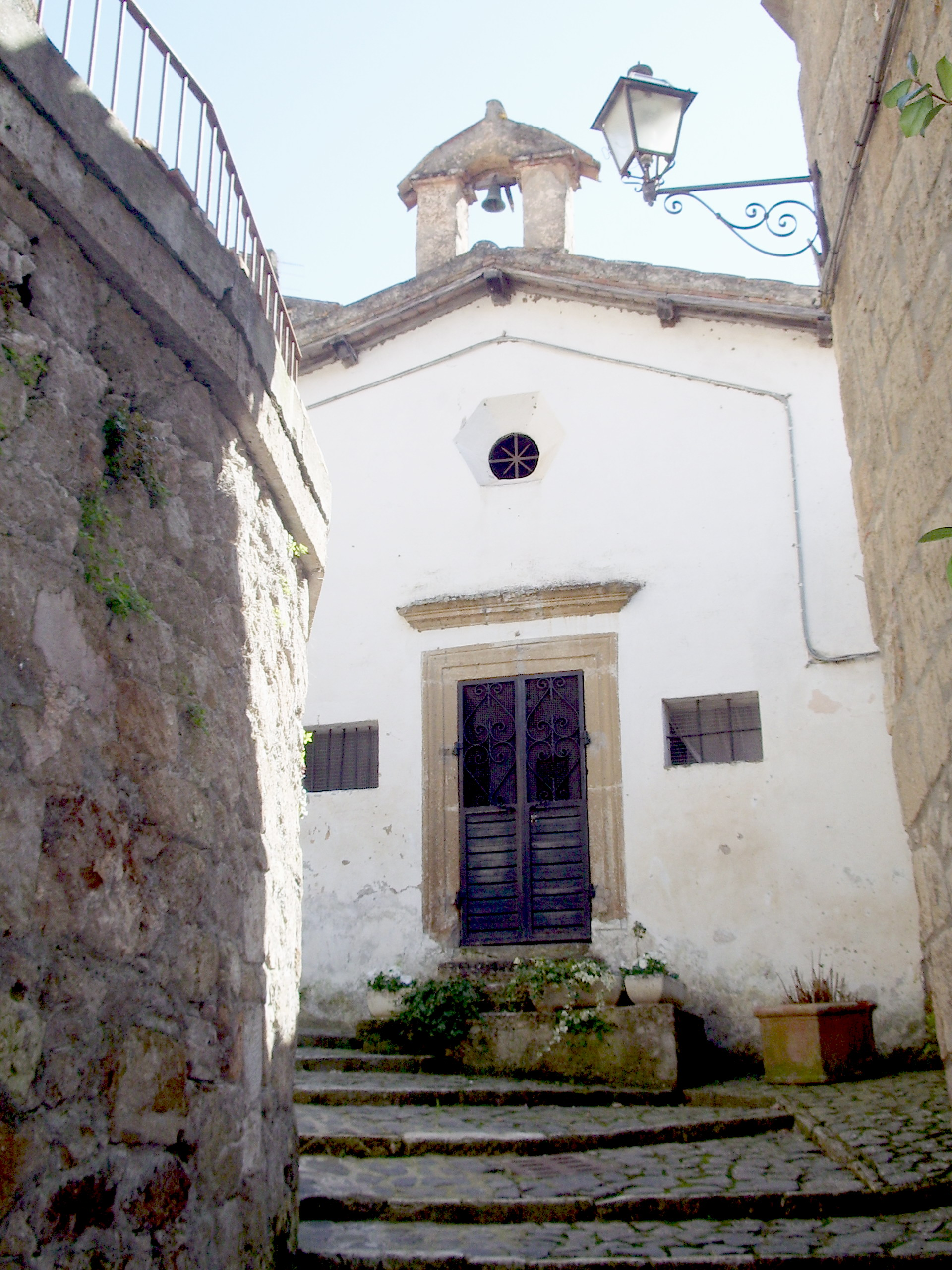 Facciata della Cappella della Madonna del Buonconsiglio a Sorano